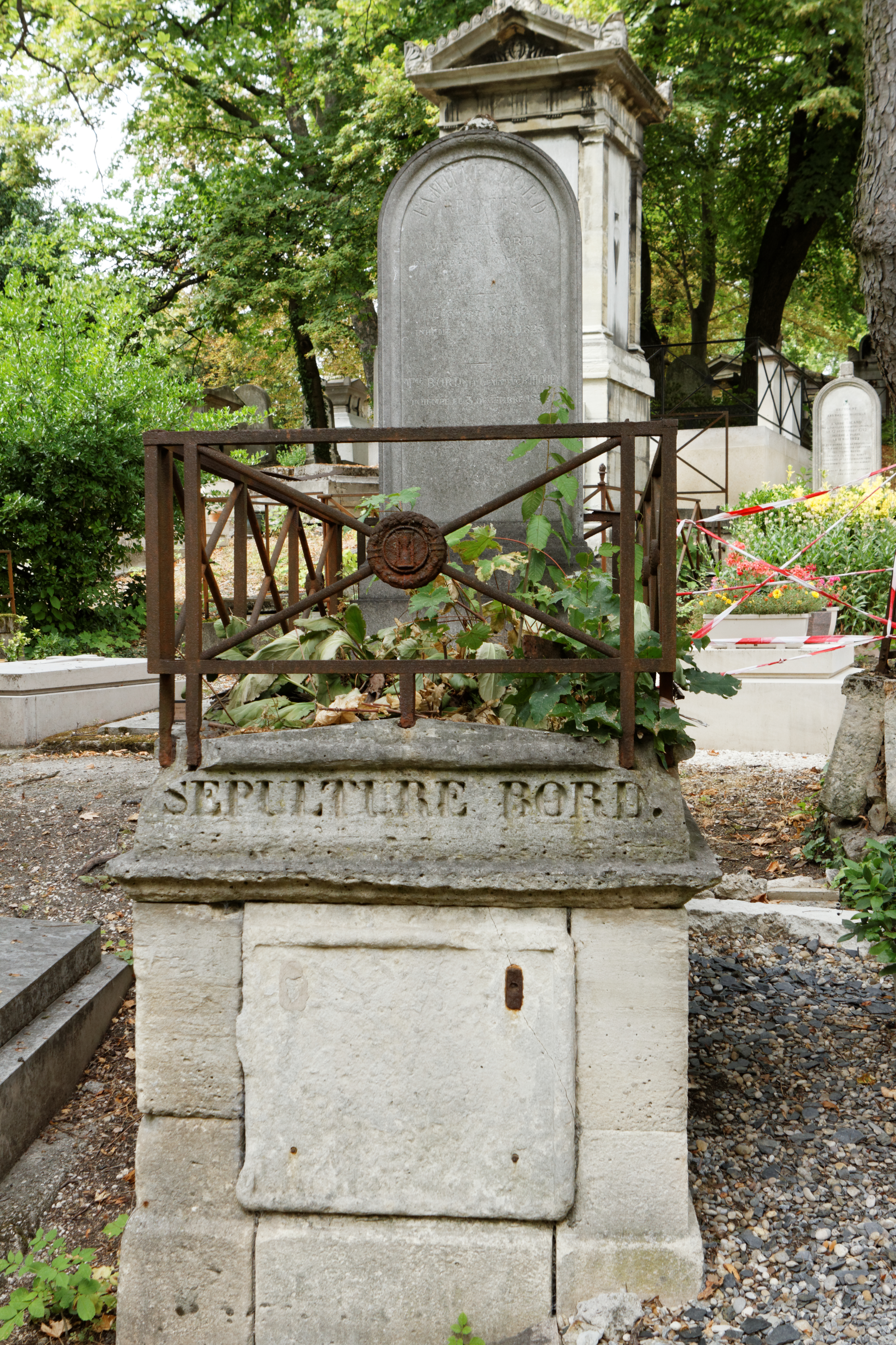 Sépulture de Léonard Bord (1744-1823), député et colonel de la Révolution et de l'Empire.